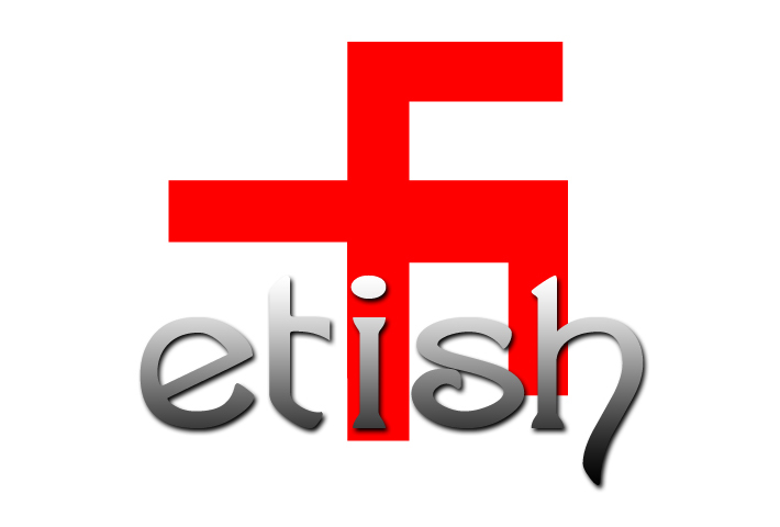 tokyo fetis love rogo_white